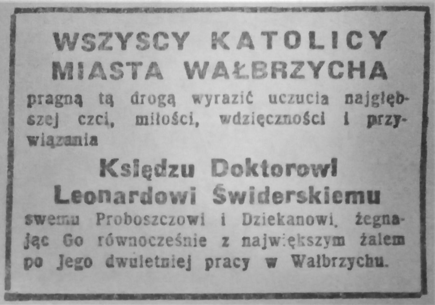 Ogłoszenie z Tygodnika Powszechnego z dn. 28.11.1948 r.